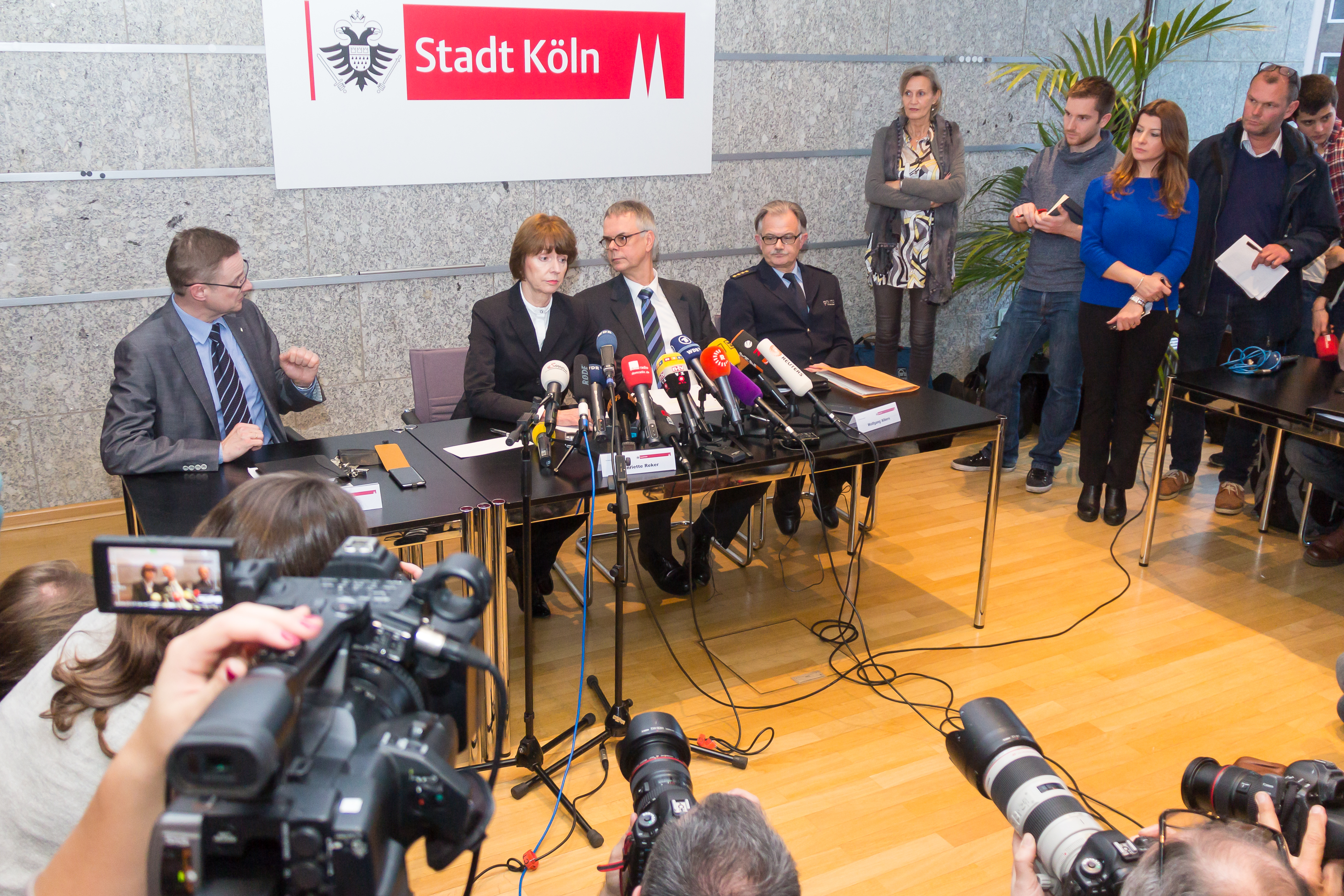 Pressekonferenz im Rathaus Köln zu den Vorgängen in der Silversternacht 2015/16 Foto: Oberbürgermeisterin Henriette Reker (links), Polizeipräsident Wolfgang Albers (Mitte)